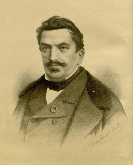 Portrait Louis van Houtte